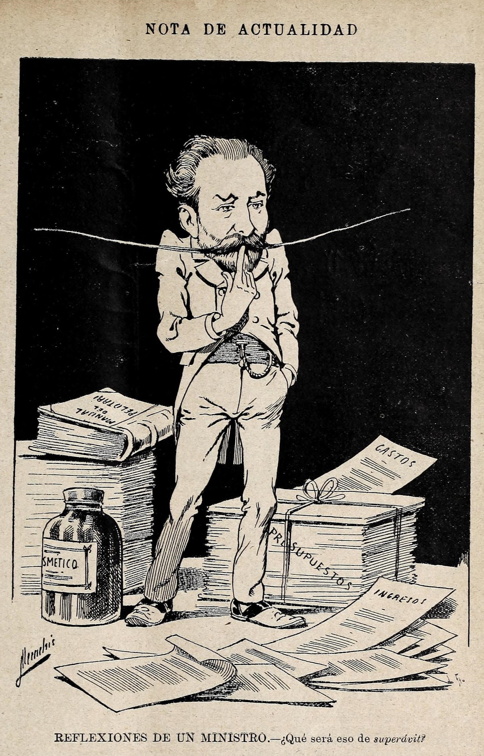 Nota de actualidad. Reflexiones de un ministro—¿Qué sera eso de superávit?